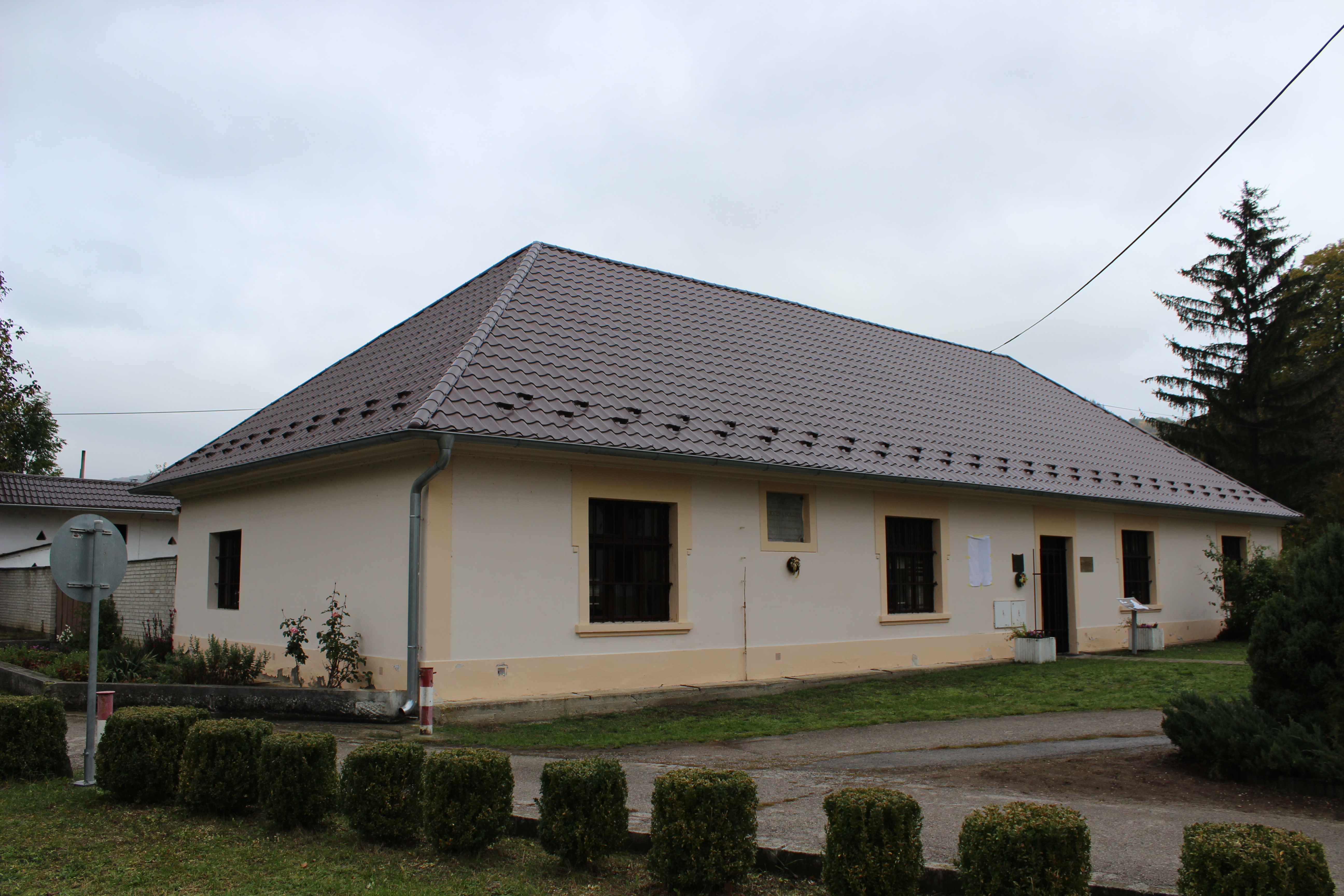 Dům Jozefa Ľudovíta Holuby v Zemianskom Podhradie.